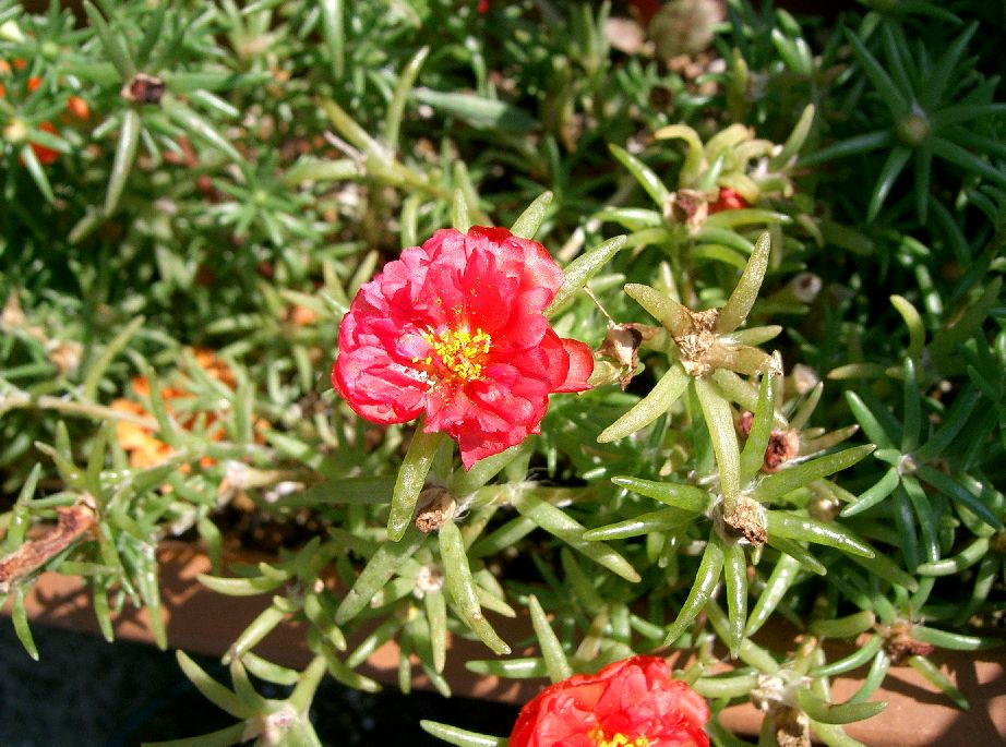 Portulaca pilosa subsp. grandiflora